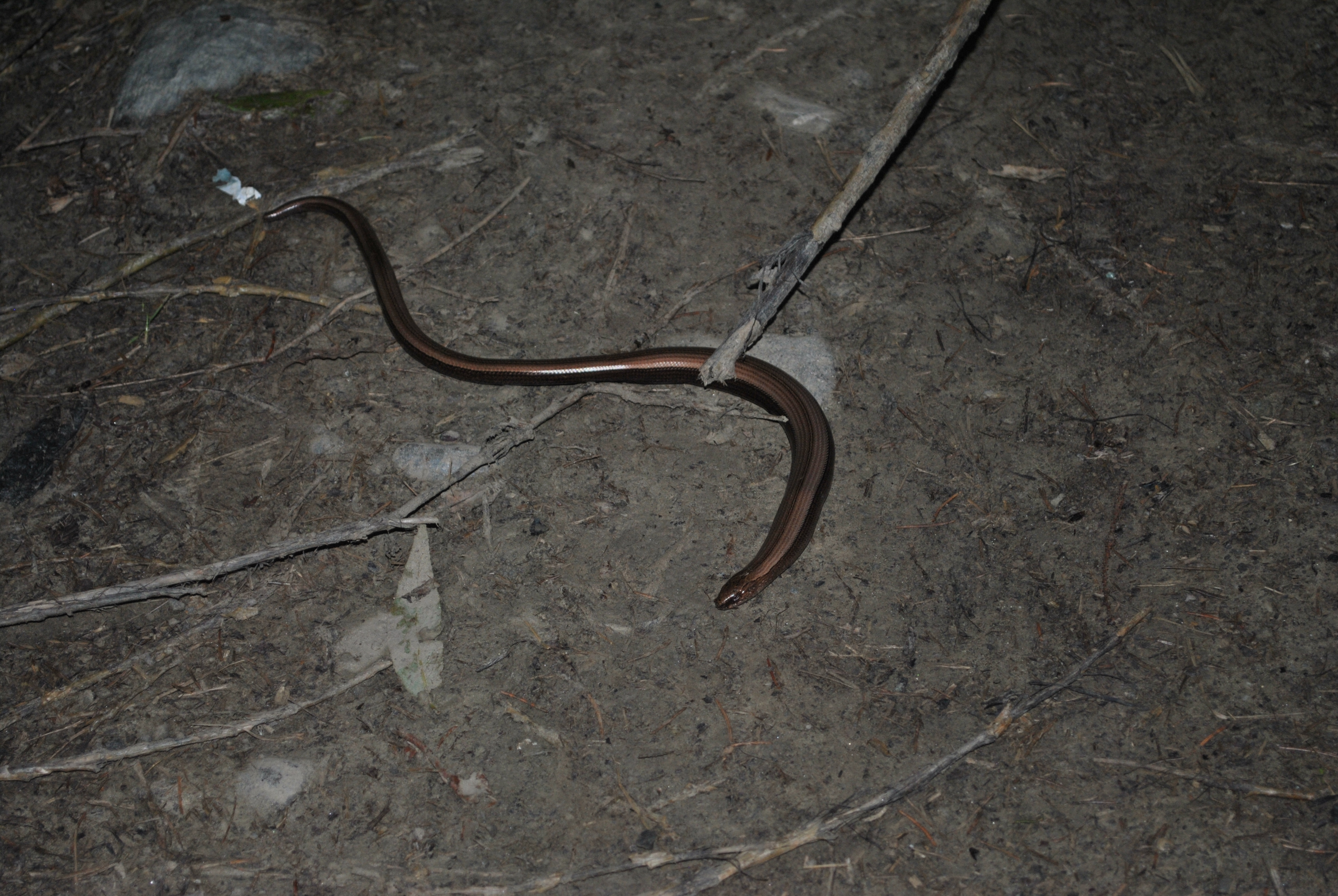 Фото зроблене в с.Богдан, Рахівського району, Закарпатська обл.